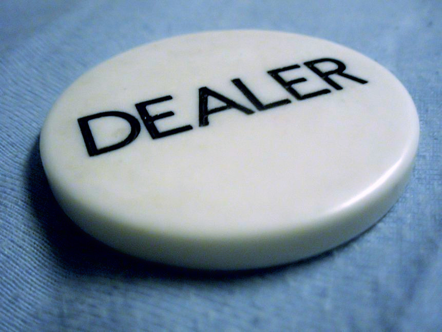 Dealerbutton